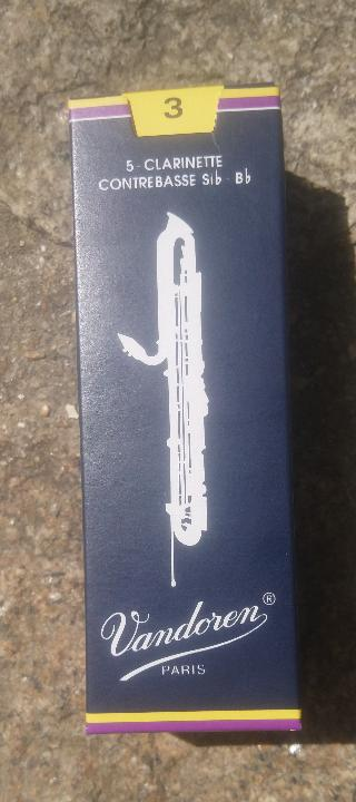 Boite d'anche clarinette contrebasse Si bémol VANDOREN - force 3